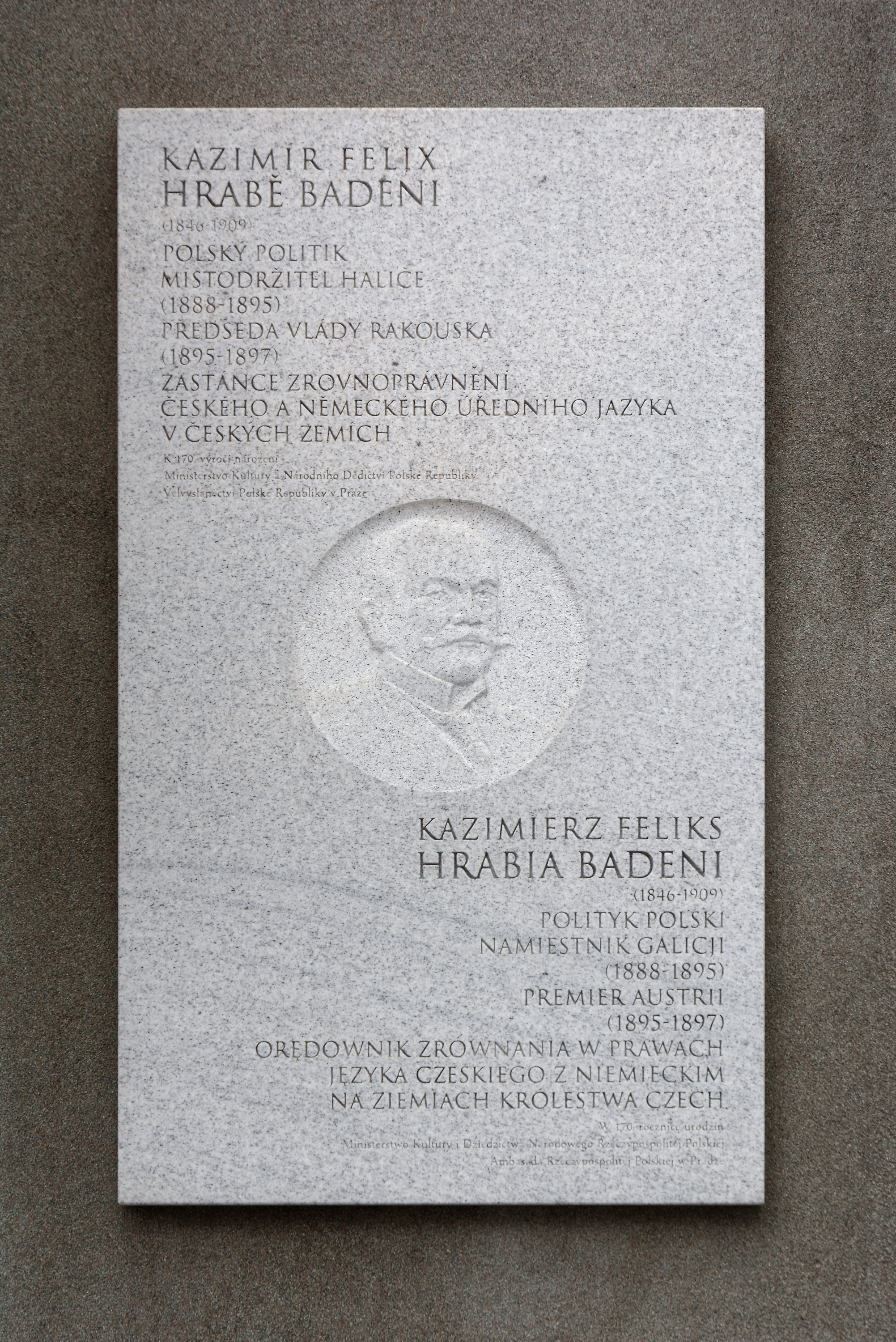 Pamětní deska Kazimíra Felixe Badeniho v Praze 6 - Hradčany, čp. 290, Badeniho 1 "Kazimír Felix hrabě Badeni (1846-1909) polský politik místodržitel Haliče (1888-1895) předseda vlády Rakouska (1895-1897) zastánce zrovnoprávnění českého a německého úředního jazykav českých zemích K 170. vžýročí narozeníMinisterstvo Kukltury a Národního Dědictví Polské Republiky Velvyslanectví Polské Republiky v Praze"